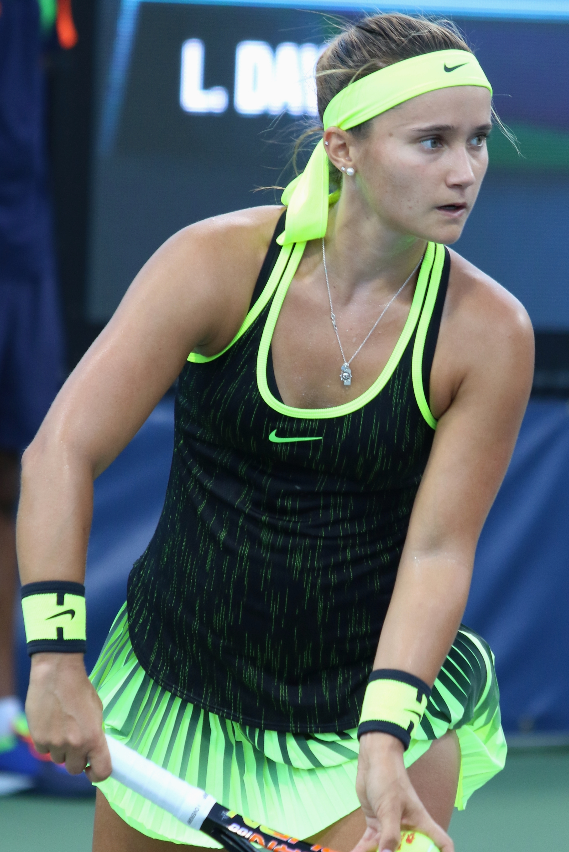 Davis US16 (13)